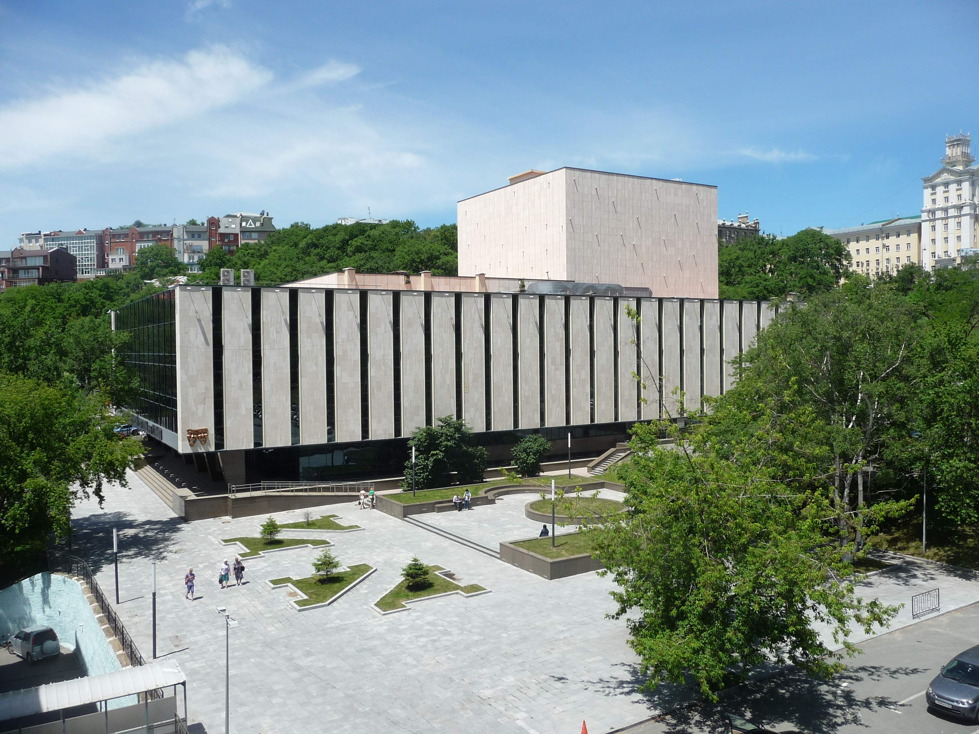 Владивосток, театр имени Горького, Светланская, 49, 2015-06-30